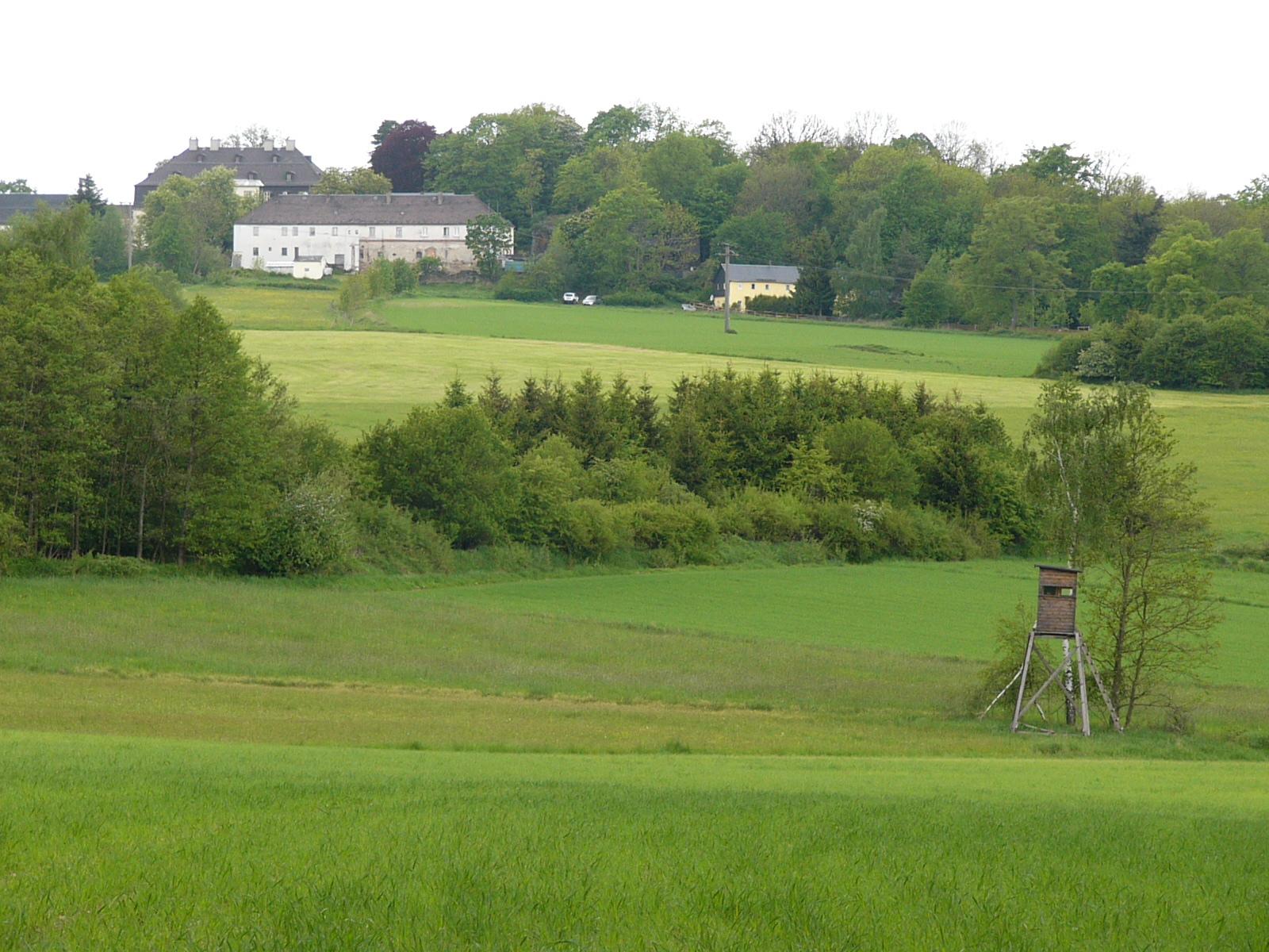 Schlossgut Brandstein